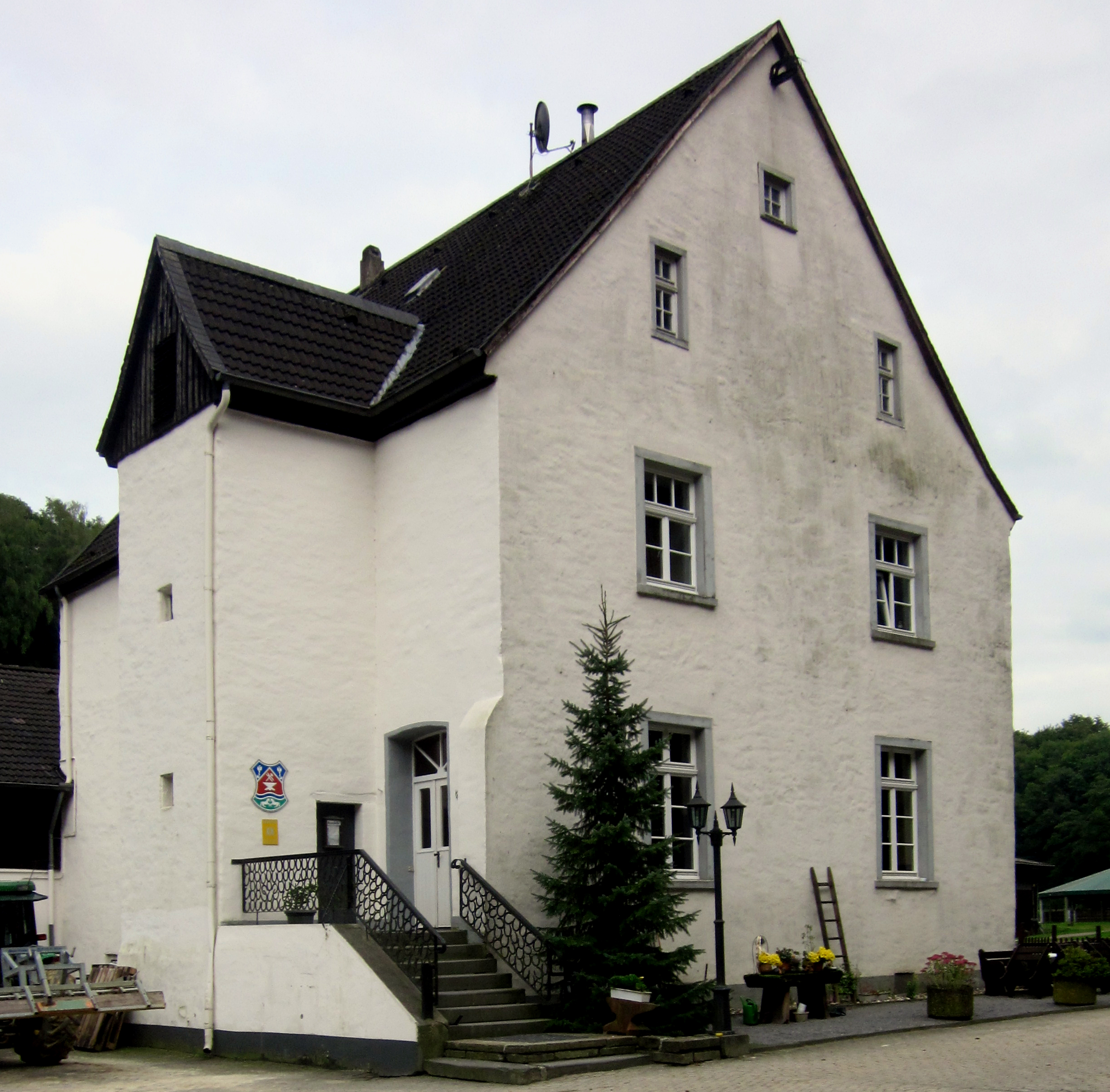 Rossdelle Rittergut Heiligenhaus Reiterhof Vogelsangbachtal